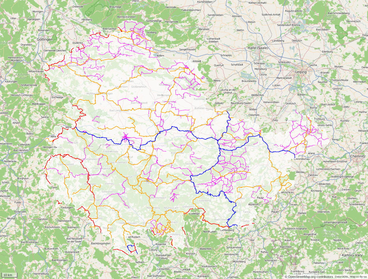 Visualisierung der in OpenStreetMap angelegten Radrouten für das Bundesland. Erstellt durch cmuelle8's Abfrage auf overpass-turbo.eu. Farbkodierung rot/red europäische und internationale Radrouten blau/blue nationale Radrouten des D-Netz orange regionale und überregionale Radrouten pink/magenta lokale und regionale Radrouten